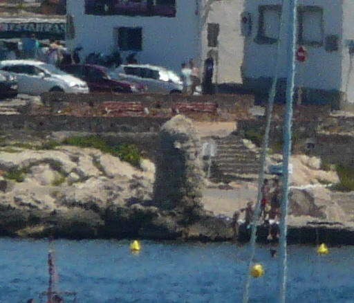 Pilons d'amarrar (l'Escala) Object location42° 07′ 39.86″ N, 3° 08′ 01.54″ E